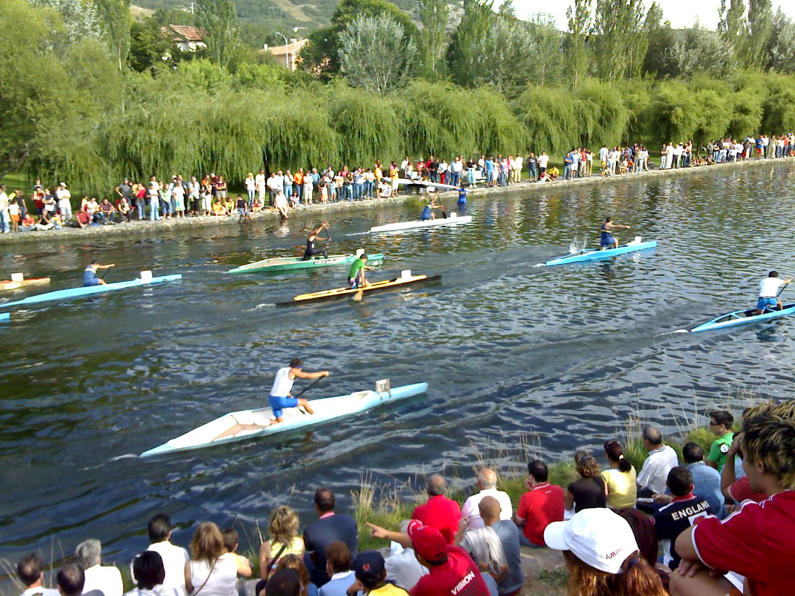 Descenso Internacional del Carrión en Velilla del Río Carrión (Palencia, Castilla y León).